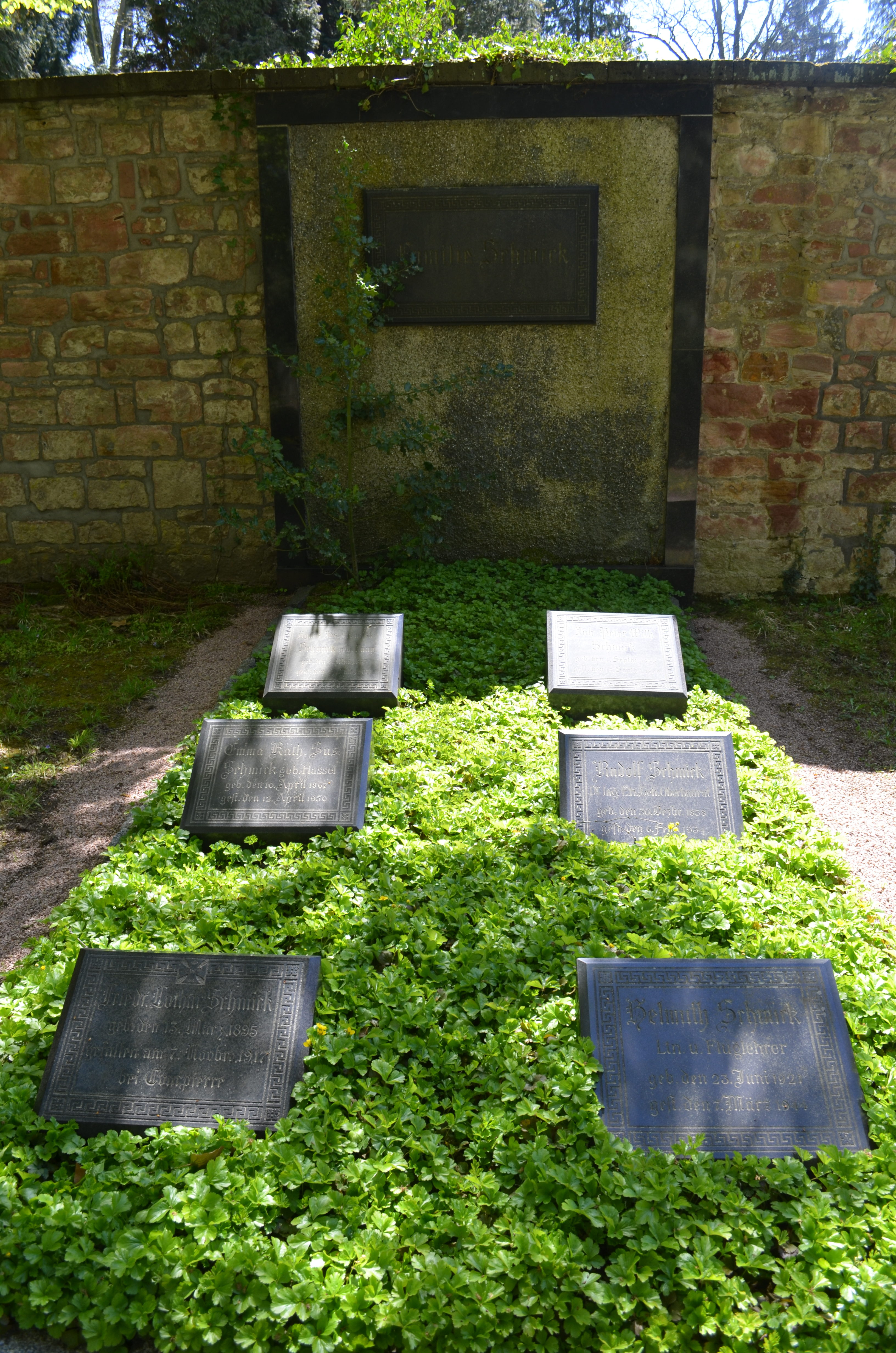 Frankfurt, Hauptfriedhof, Ehrengrab J adm 465, Peter Schmick